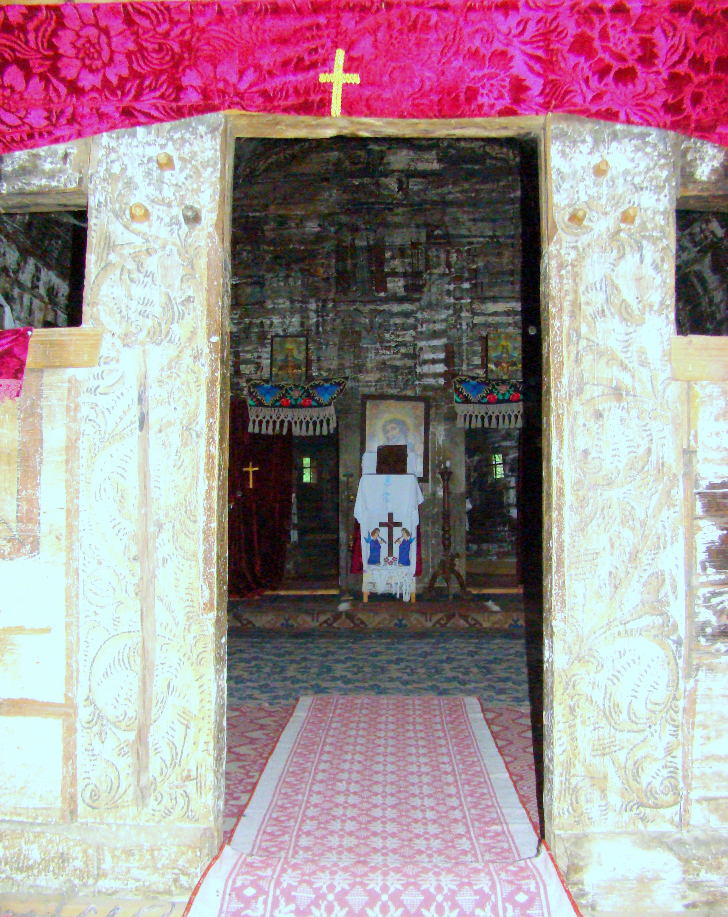 Biserica de lemn din Someșu Rece, județul Cluj